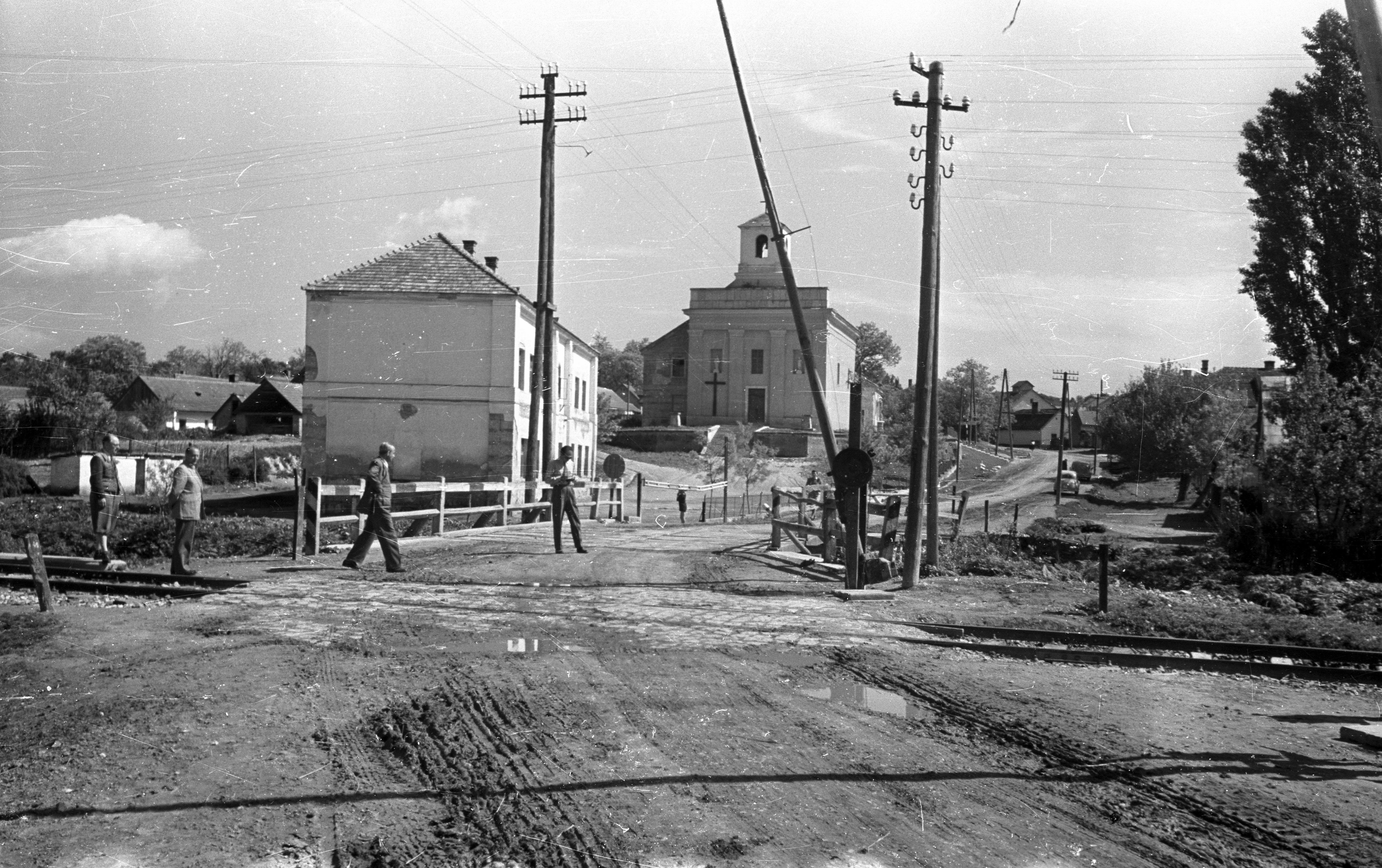 Fő utca, háttérben a Szent Kereszt feltalálása templom. Location: Hungary, Vértesacsa Tags: barrier, railroad crossing Title: Fő utca, háttérben a Szent Kereszt feltalálása templom.